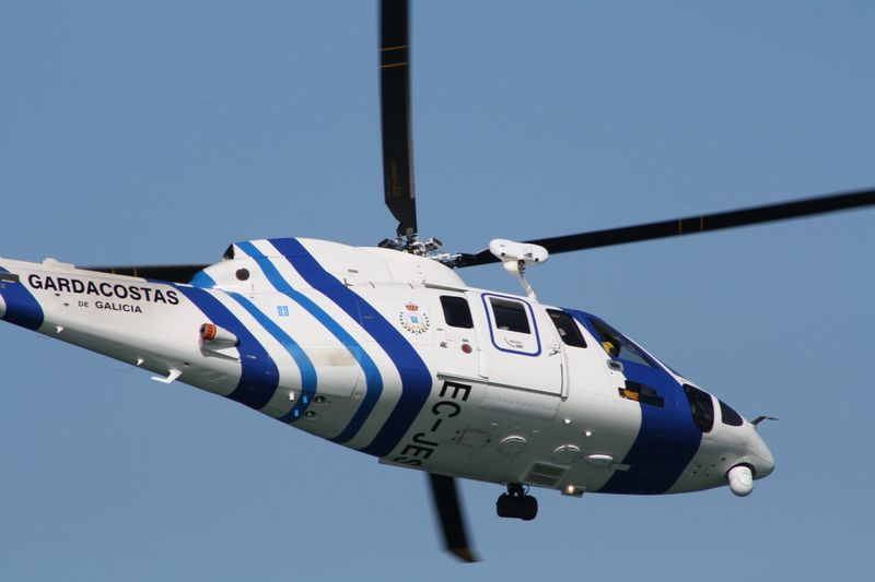 Helicóptero Sikorsky 76 C+ (EC-JES) "Pesca 1" del Servicio de Guardascostas de Galicia en el festival aéreo de Vigo